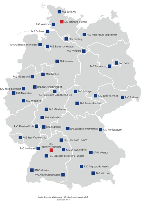 Die Regionale Arbeitsgruppen (RAGs) und Landesarbeitsgemeinschaften (LAGs) von Gegen Vergessen - Für Demokratie e.V., Stand Juni 2018